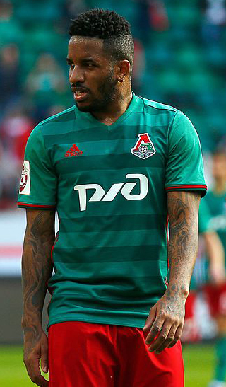 «Локомотив» - «Рубин»